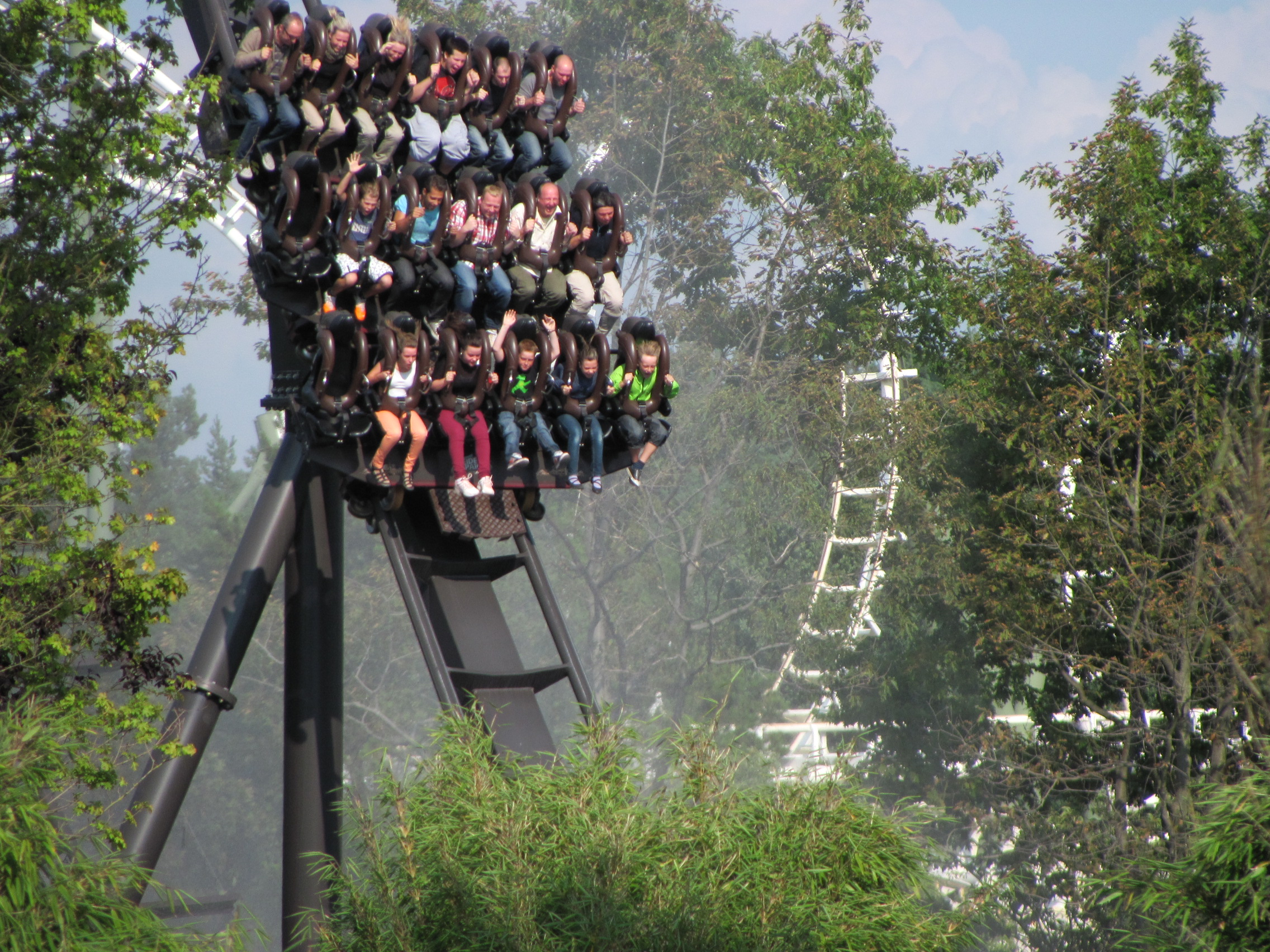 Zug der KRAKE in der Ausfahrt vom Immelmann.